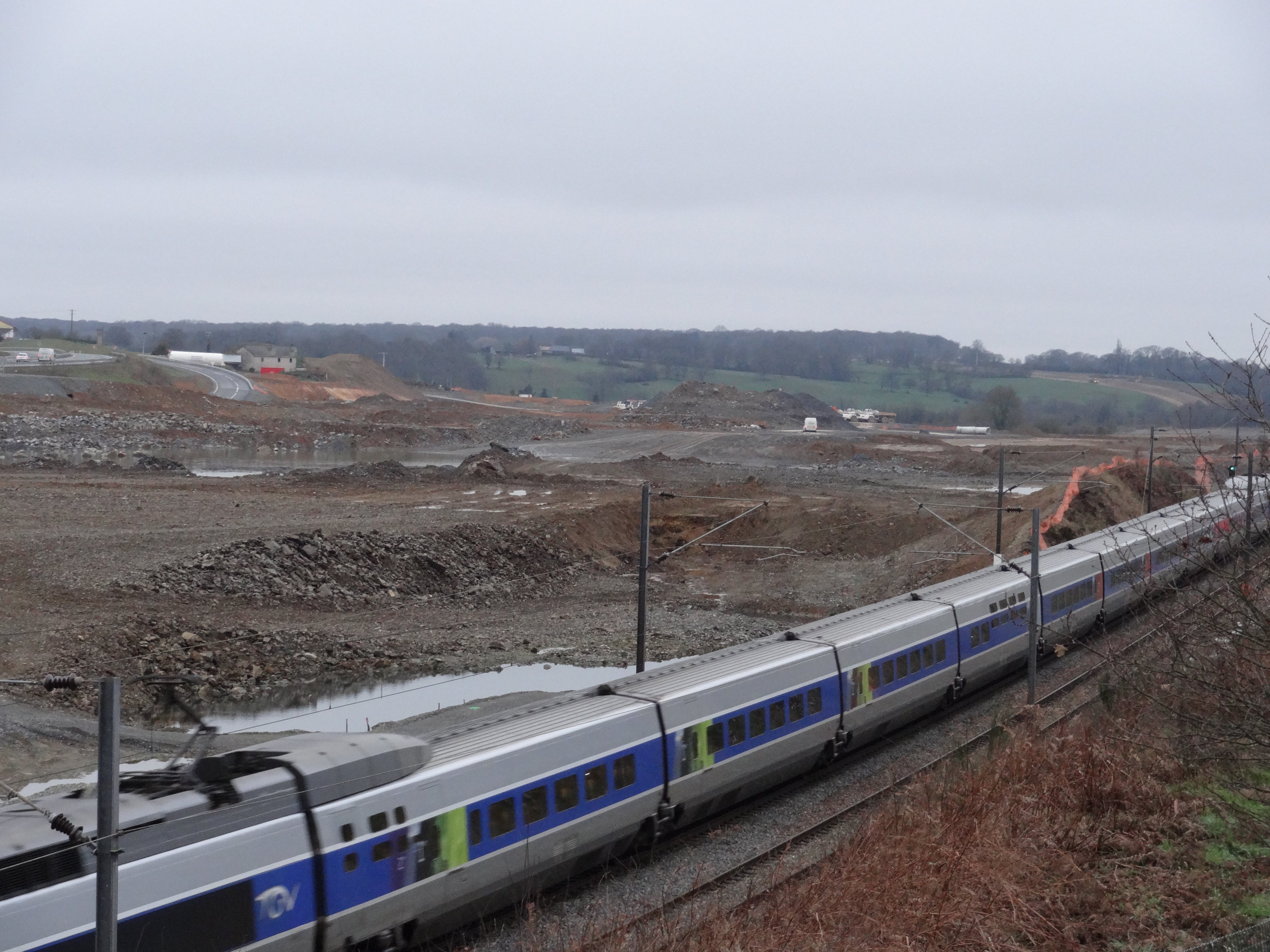 Au premier plan, passage d'un TGV sur la ligne Paris-Rennes. Au second plan, travaux du raccordement ouest de Laval entre la ligne Paris-Rennes et la LGV Bretagne - Pays-de-la-Loire